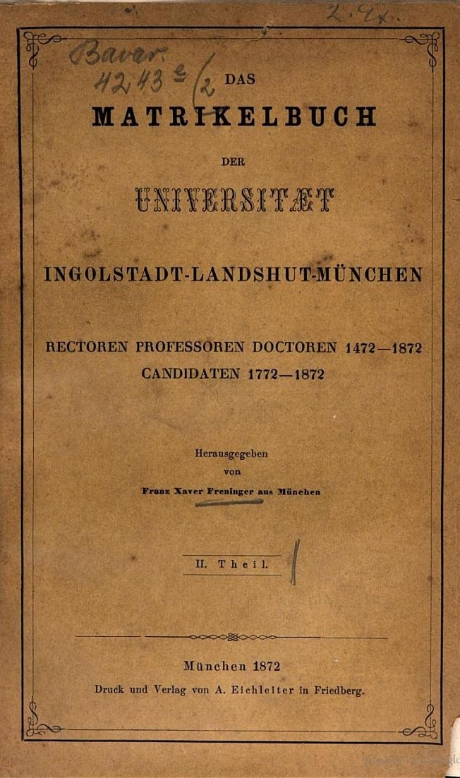 Titelseite des Matrikelbuchs Ingolstadt–Landshut–München